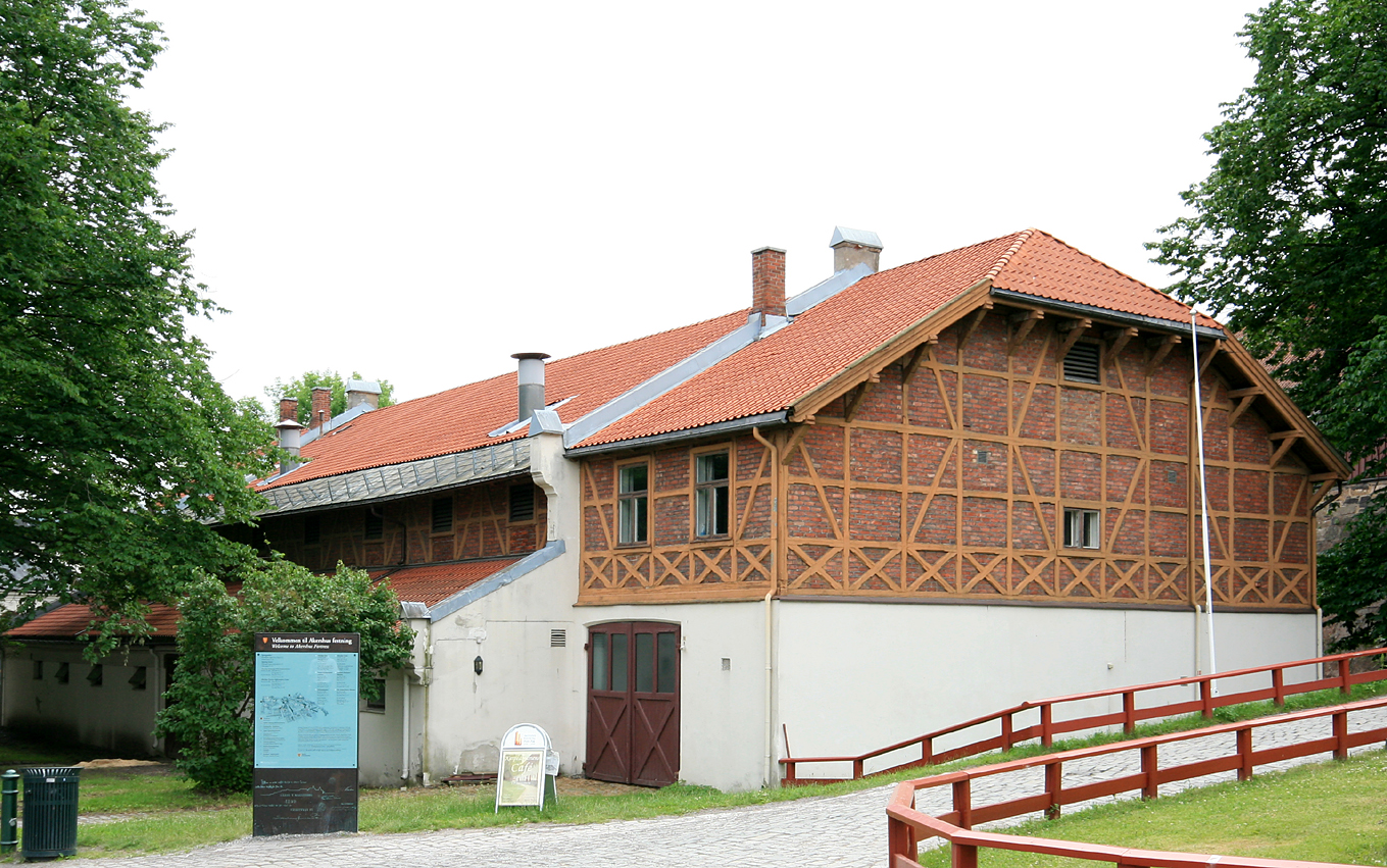 Offisersstallen, Myntgata, Oslo. Bygd 1891; arkitekt Henrik Nissen. Brukes i dag av politiets rytterkorps.